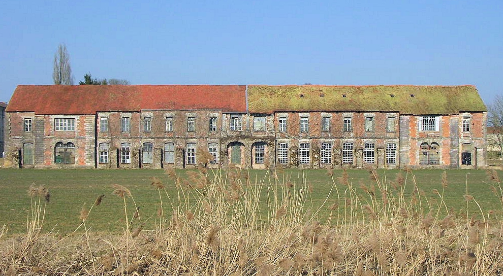 France - Bourgogne - Abbaye de Cîteaux - Le bâtiment du définitoire. 17ème siècle. Édifié sous l'abbatiat de Dom Jean Petit achevé en 1699